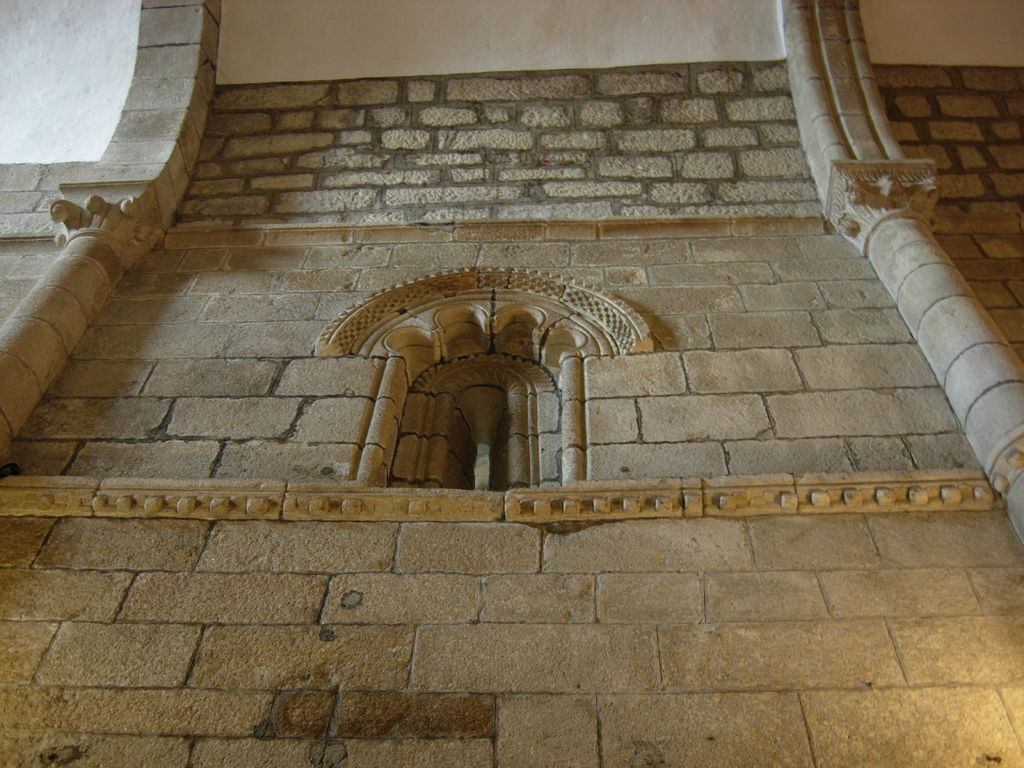 Ventá con arco tetralobulado e chambrana axedrezada nun dos panos do muro norte da Igrexa de San Martiño de Sobrán - Vilagarcía de Arousa - Pontevedra